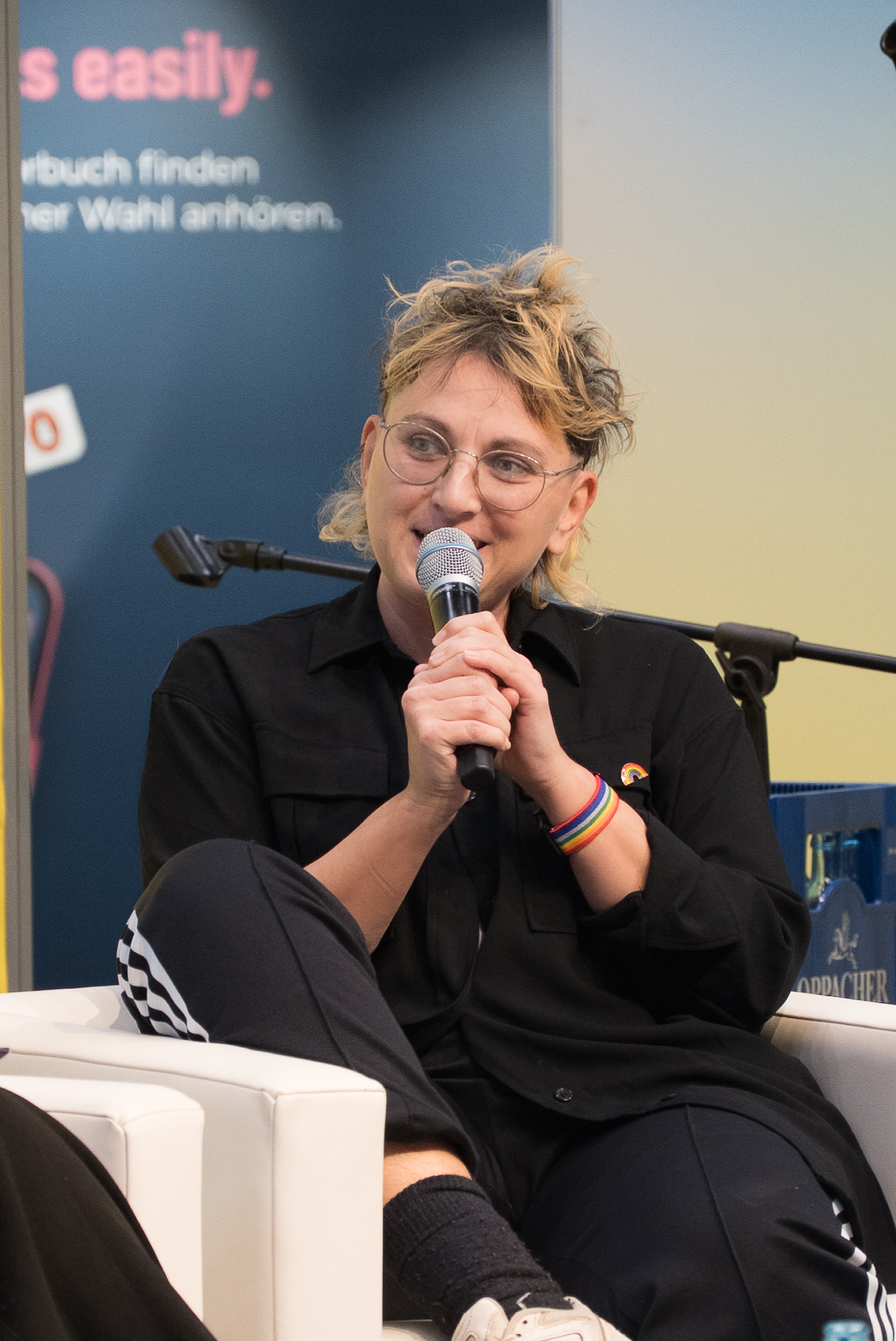 Sarah Berger während einer Lesung im LCB